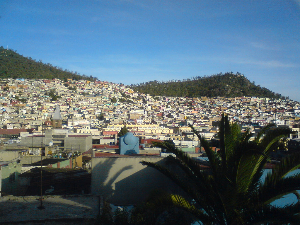 Pachuca desde los barrios altos